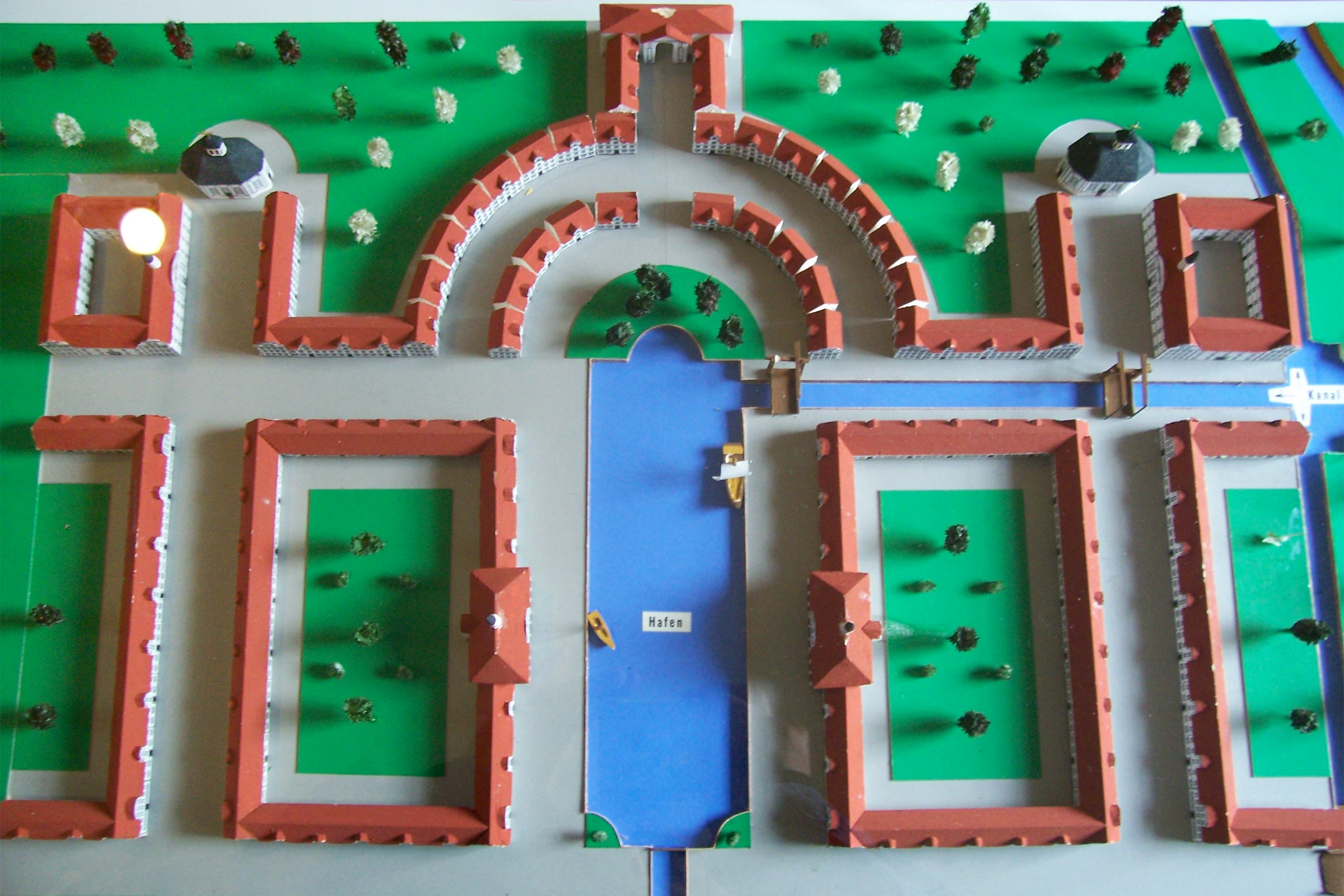 Ursprüngliches Stadtmodell der Hugenottenstadt Bad Karlshafen (Deutschland).